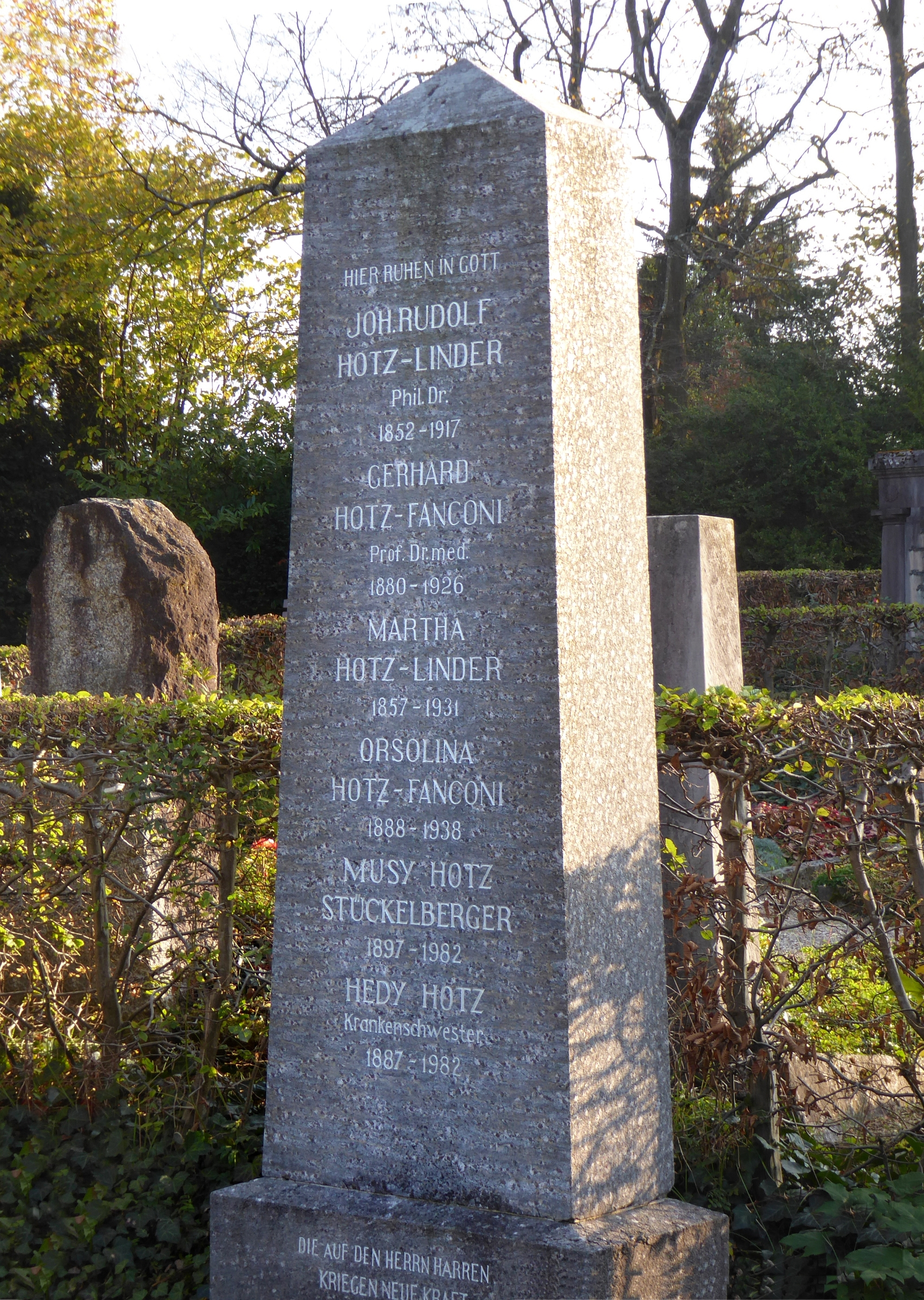 Gerhard Hotz-Fanconi (1880–1926) Chirurg. Familiengrab: Hotz-Linder-Fanconi-Linder-Stückelberger. Grab auf dem Friedhof Wolfgottesacker, Basel